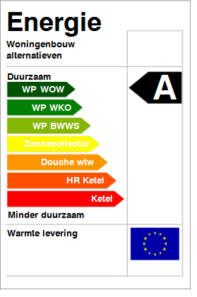 Energie label warmte uit oppervlaktewater